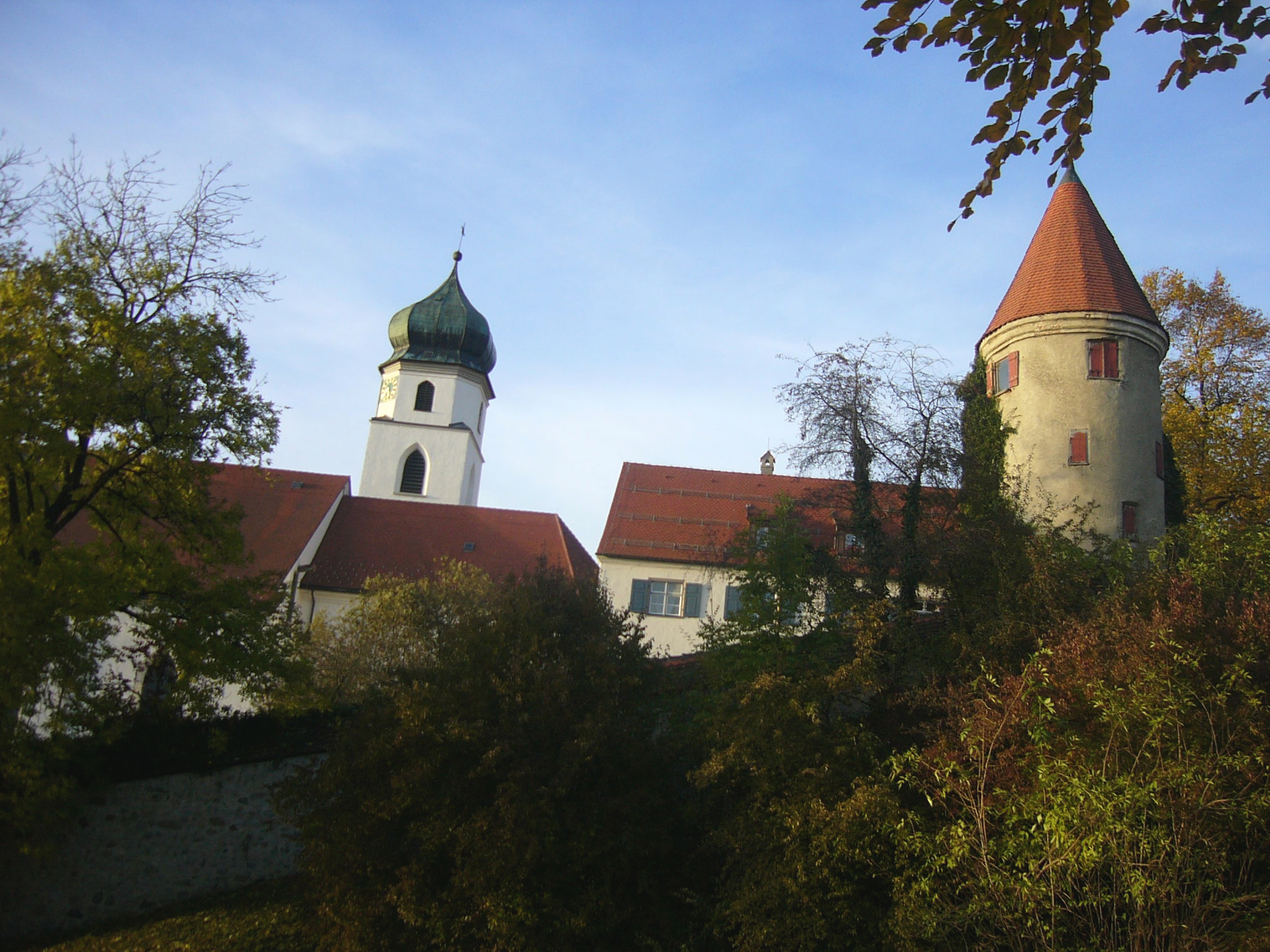 Leutkirch im Allgäu. Katholische St.-Martins-Kirche und Pulverturm. Selbst fotografiert am 25.10.2005